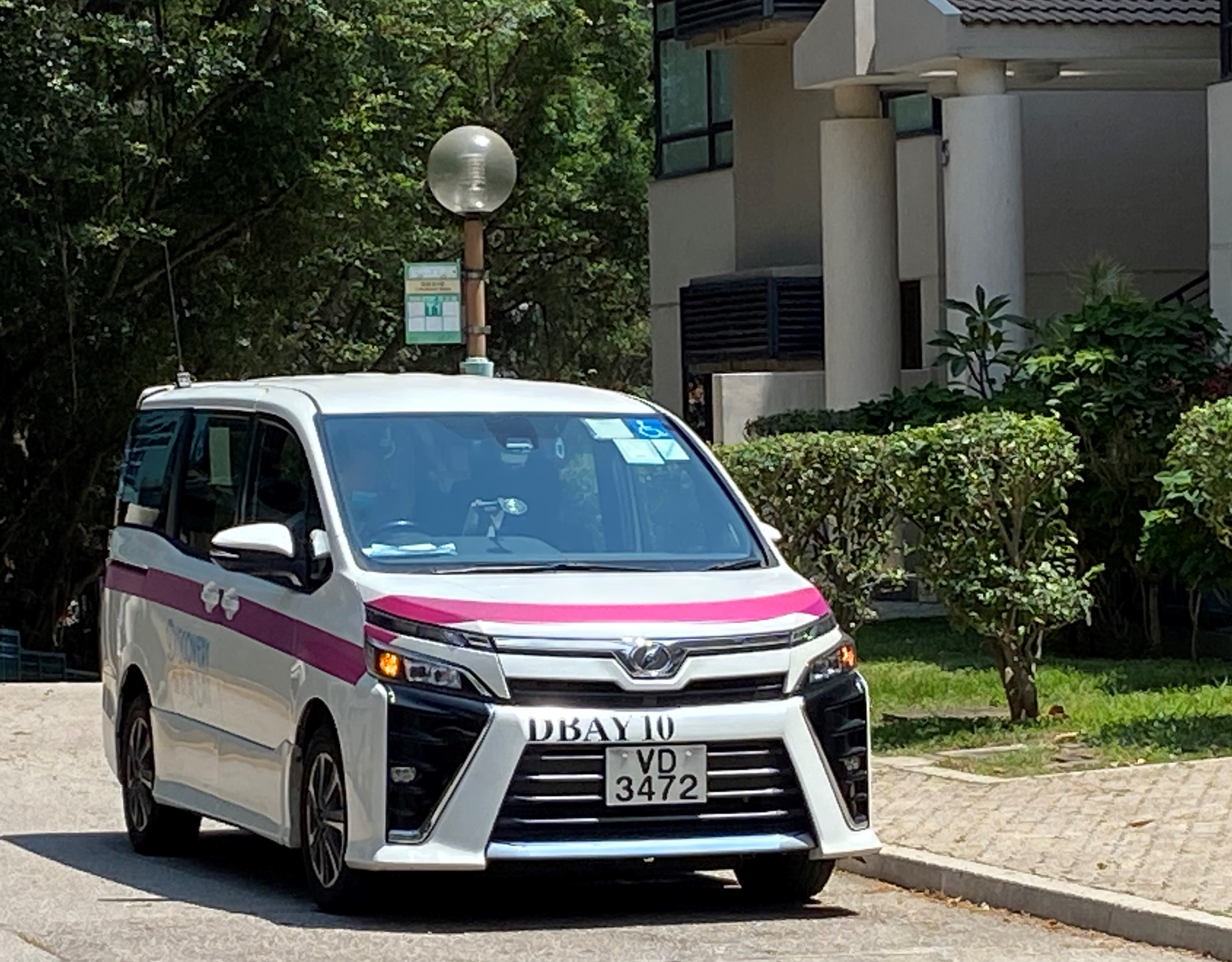 愉景灣Hire Car